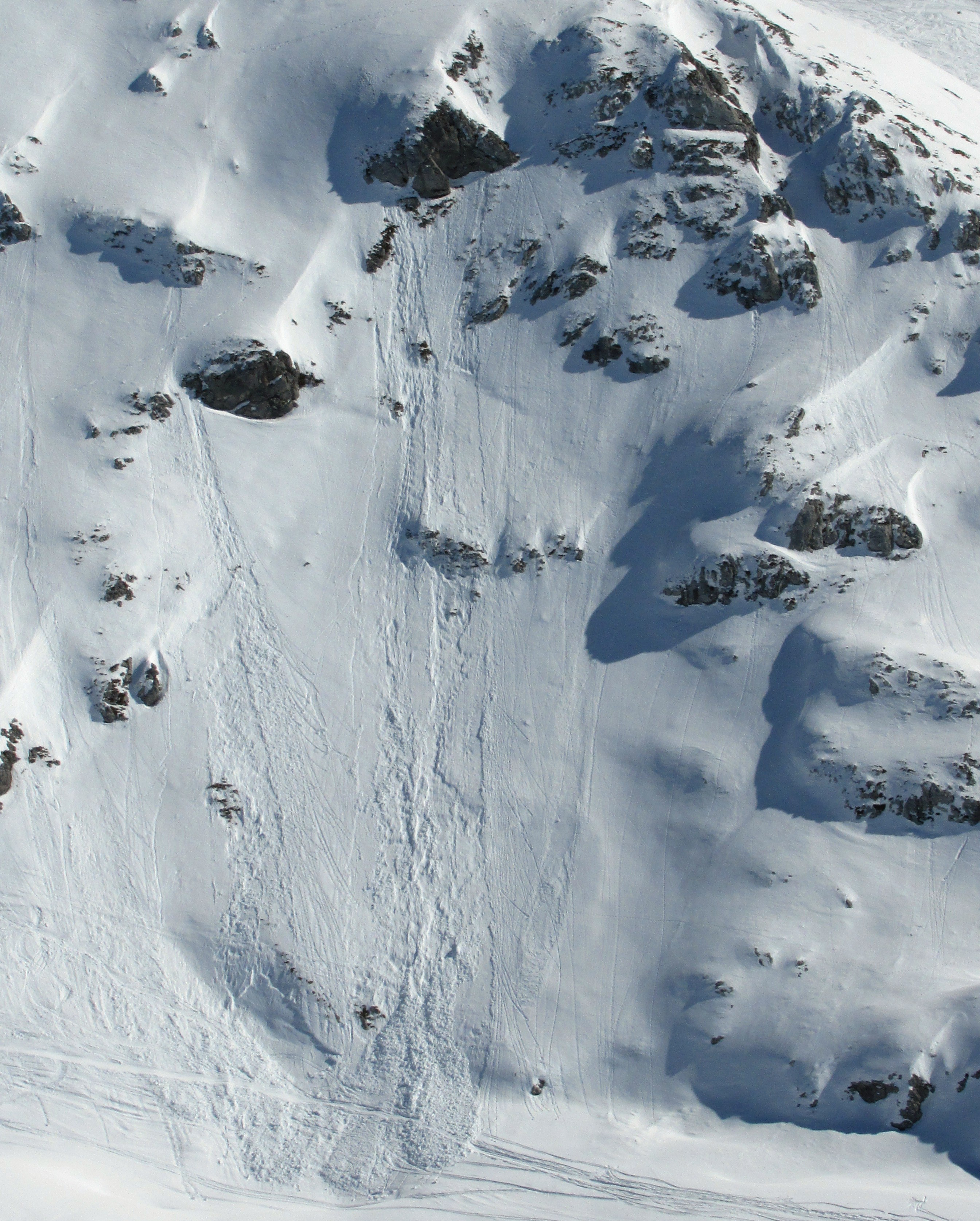 Lockerschneelawinen am Windschartenkopf